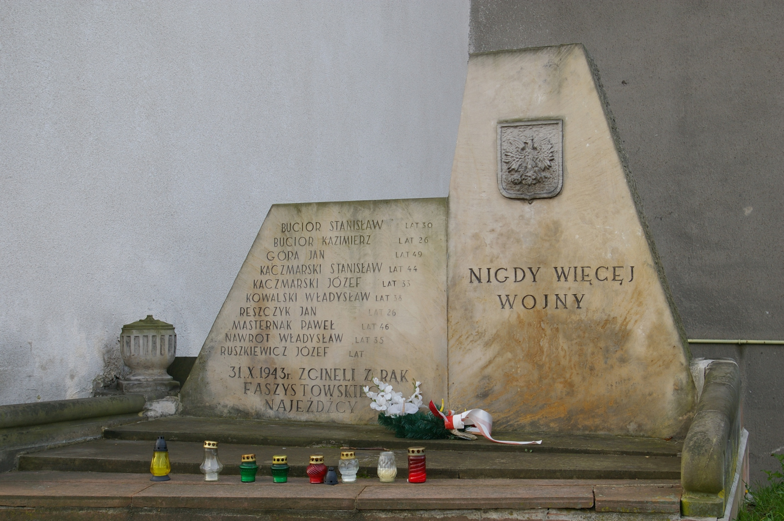 Pomnik na miejscu straceń przy ulicy Sandomierskiej w Ostrowcu Świętokrzyskim